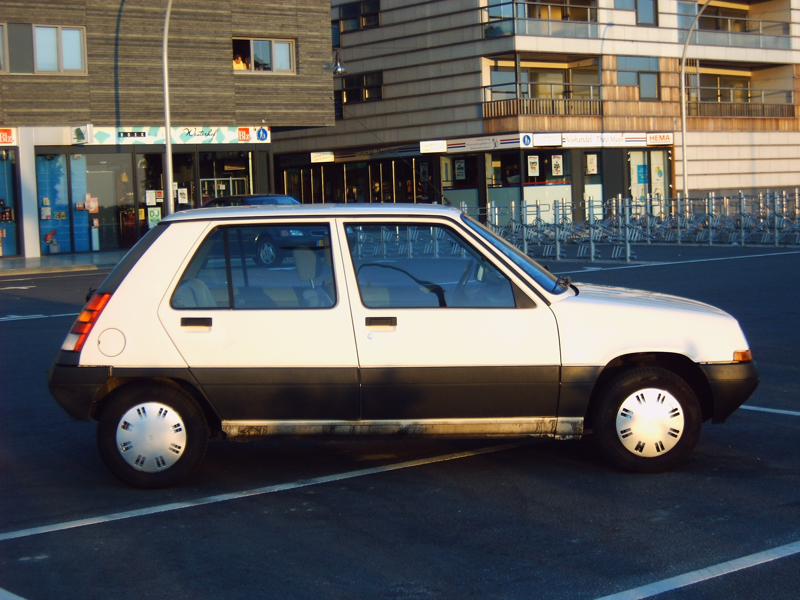 Foto gemaakt door Monique Korthuis